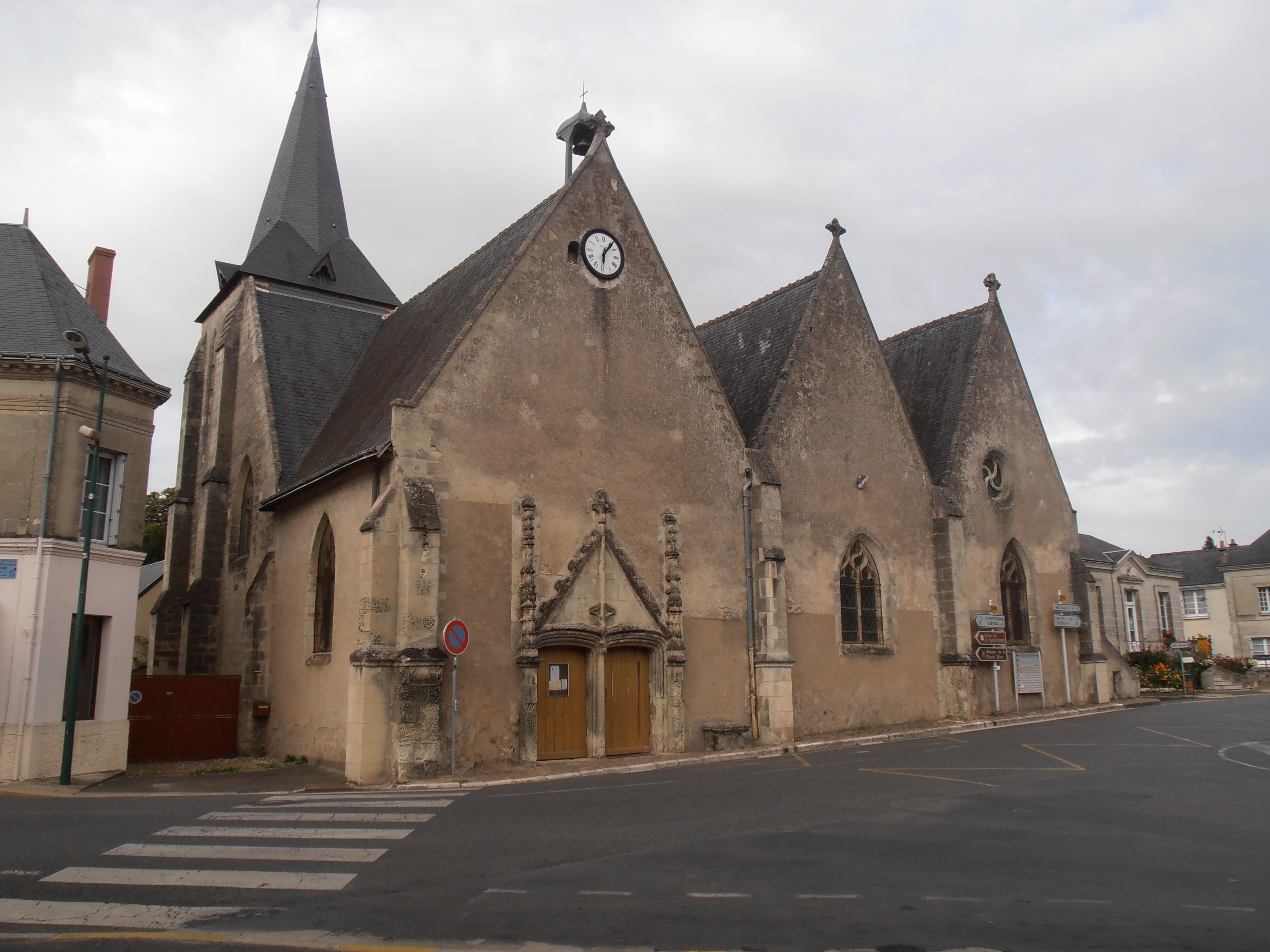 L'église de Saint-Paterne-Racan